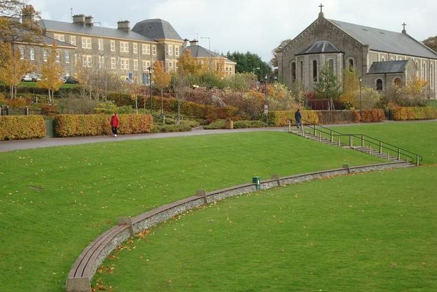 St Conal's Hospital, Letterkenny